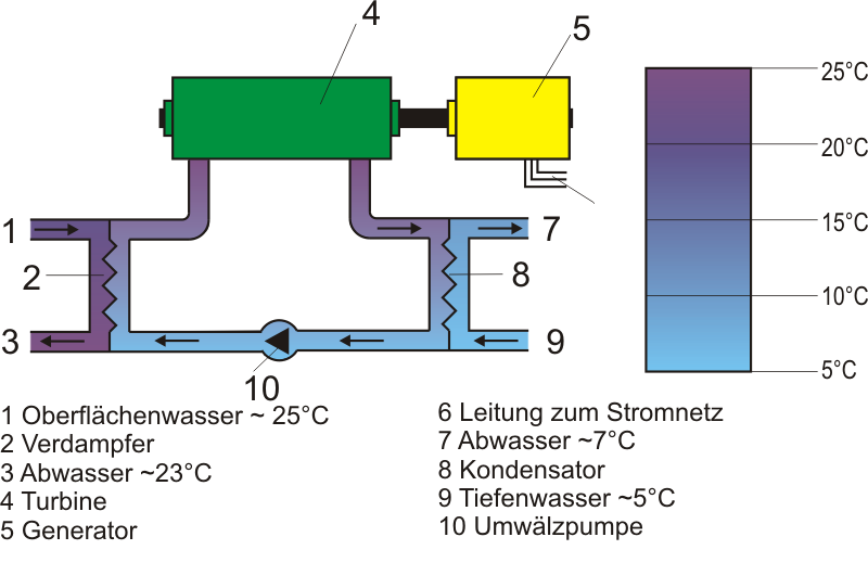 Closed Cycle OTEC diagram